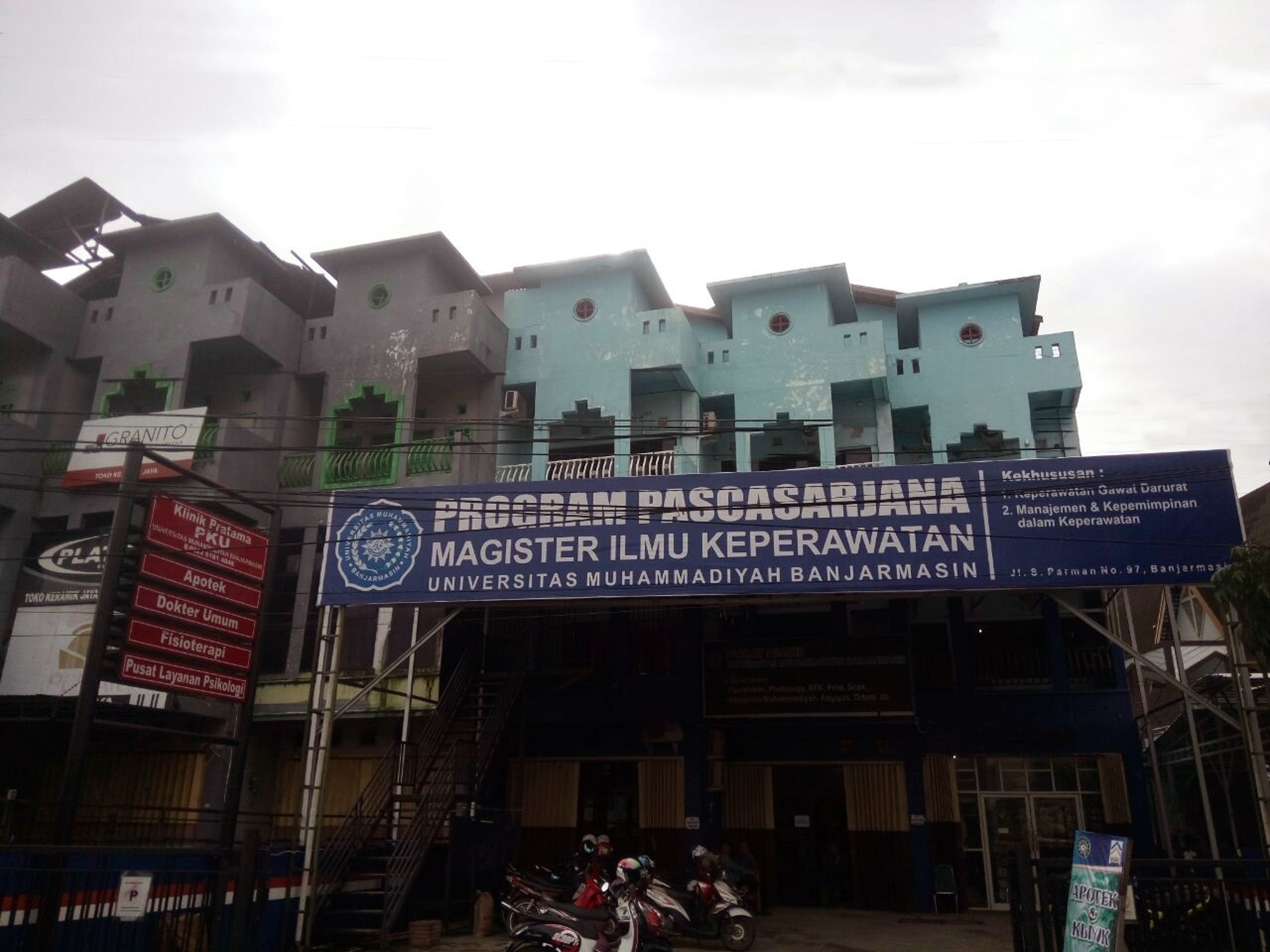 Kampus 2 Universitas Muhammadiyah Banjarmasin, beralamat di Jl. S. Parman No.98 Banjarmasin Kel. Pasar Lama, Kec. Banjarmasin Tengah, Kalimantan Selatan 70114